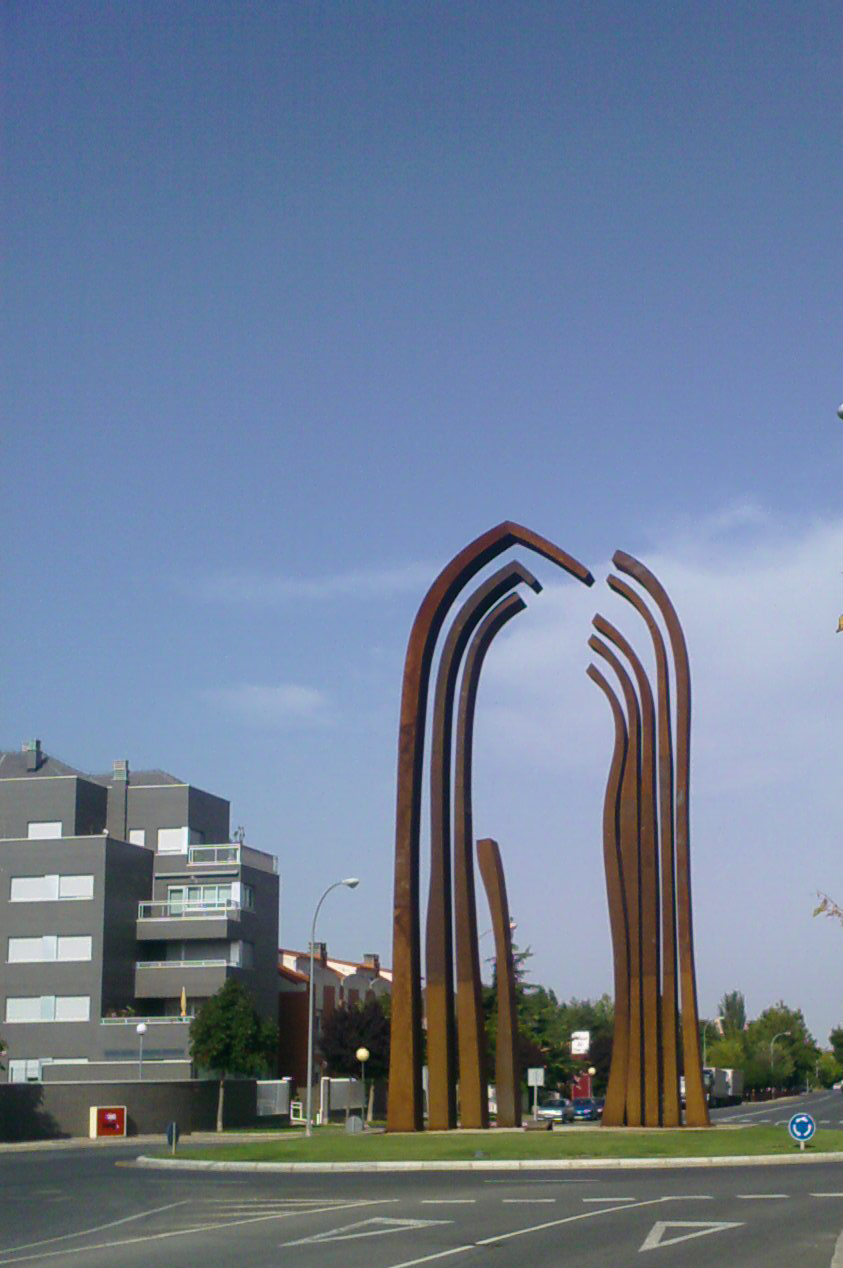 Puerta Oeste de Logroño